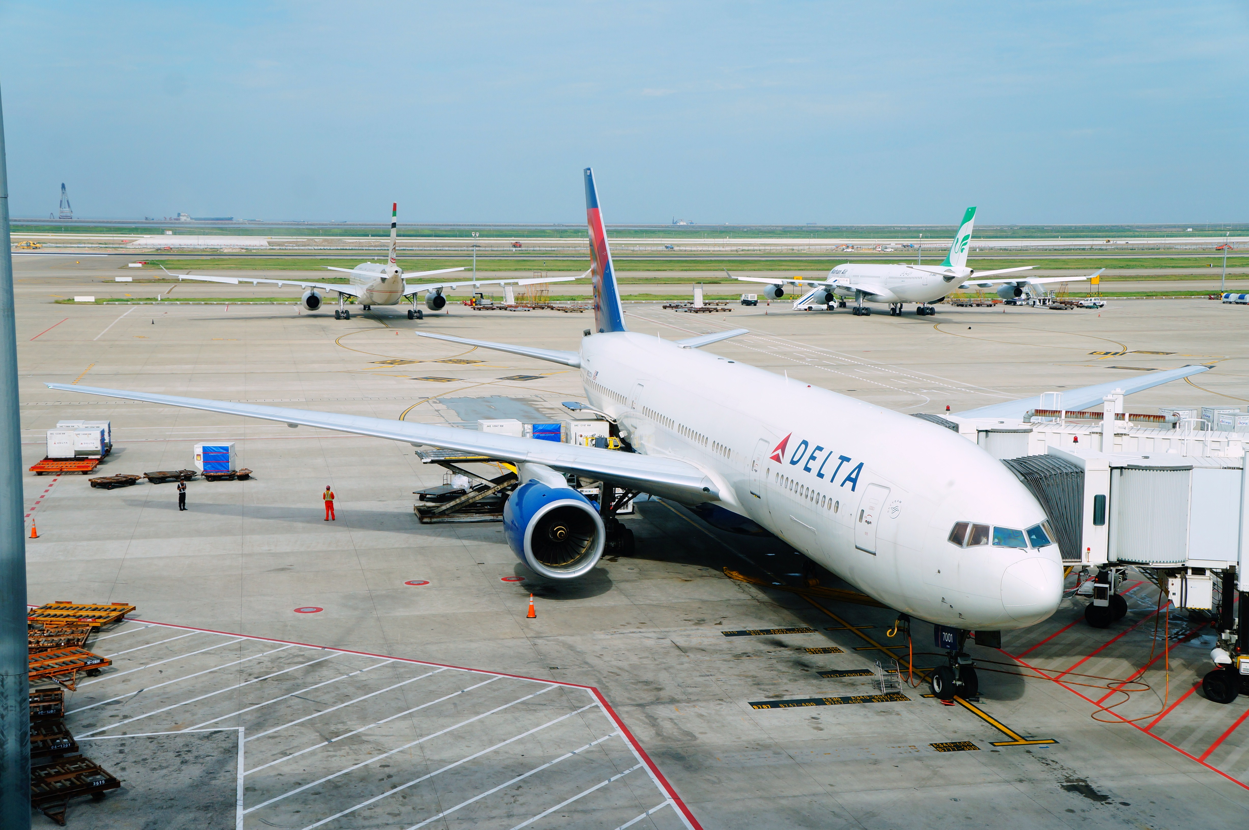 Delta Airlines B777-200ER